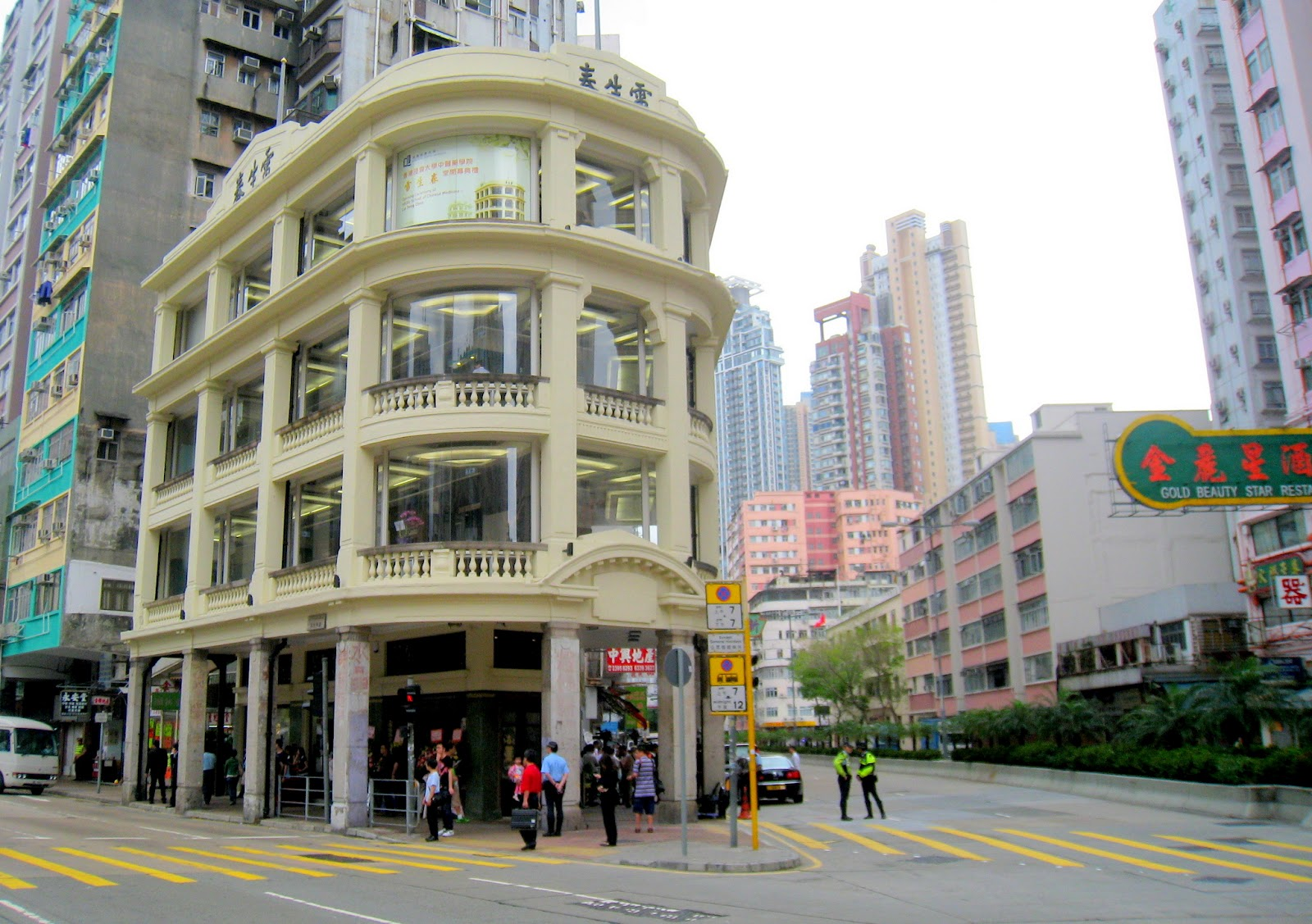 雷生春的中醫診所開幕當日（2012年4月25日）